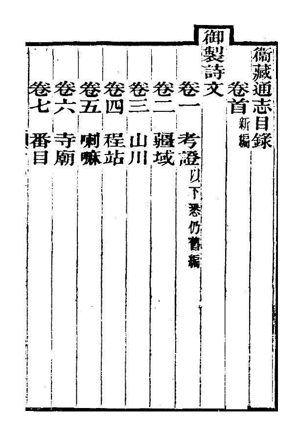 衛藏通志，嘉慶時期記錄西藏歷史的一本古書，共16卷。